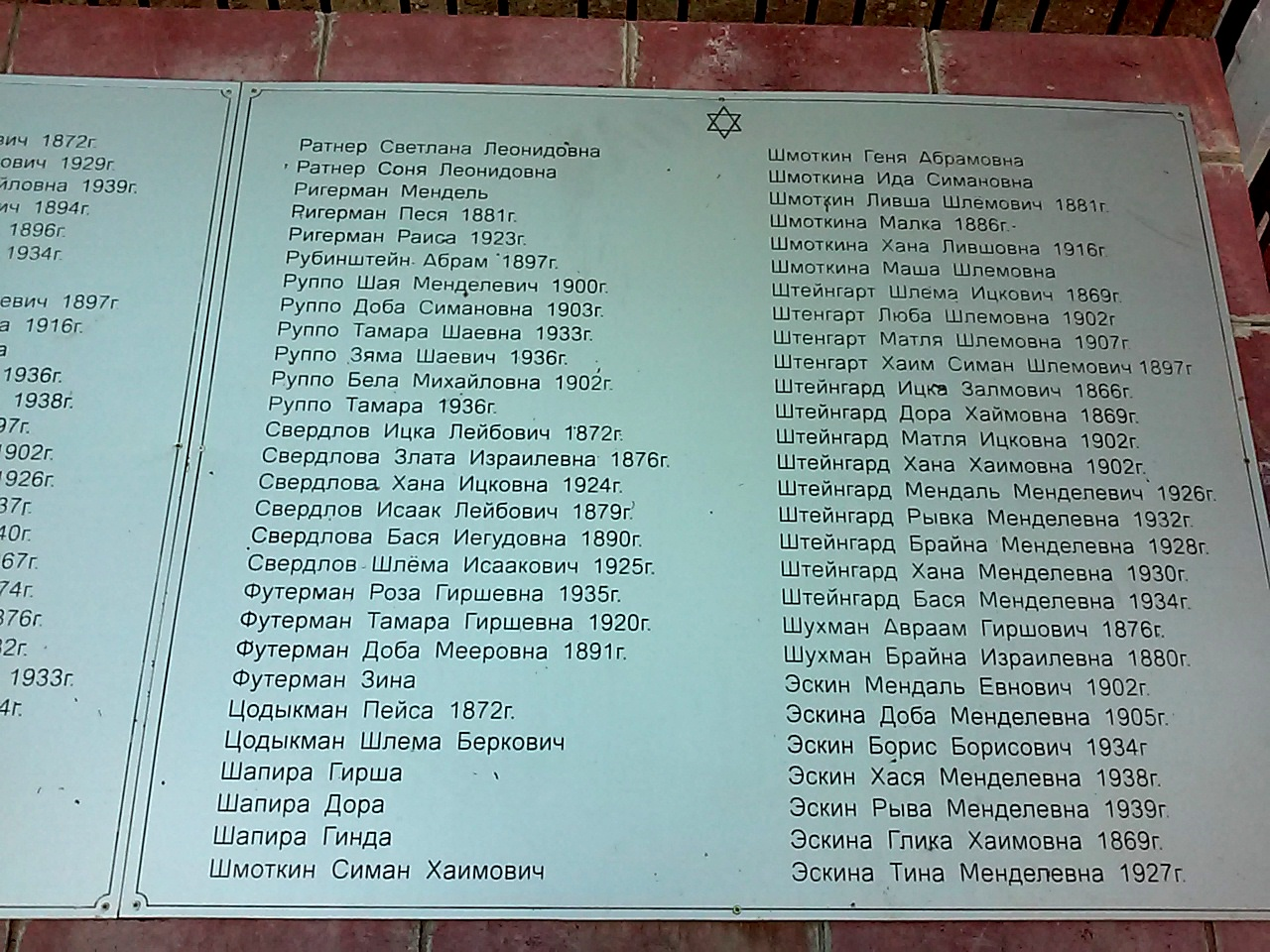 Часть списка убитых евреев деревни Камень Лепельского района, убитым нацистами 17 сентября 1941 года. Находится на памятнике, расположенном примерно в полукилометре севернее деревни, после кладбища, слева от дороги в урочище Борки